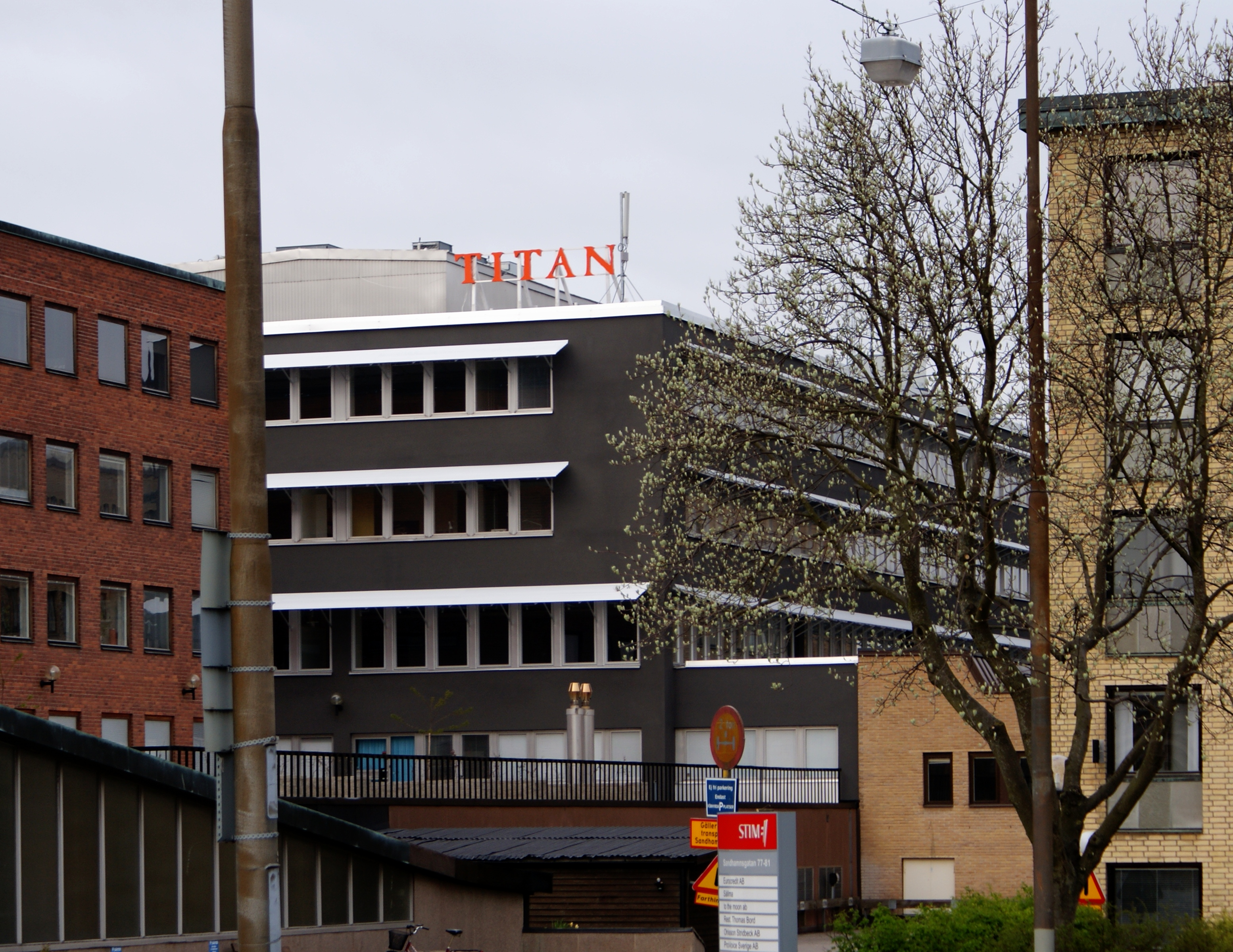 Titan televisions kontor i Stockholm